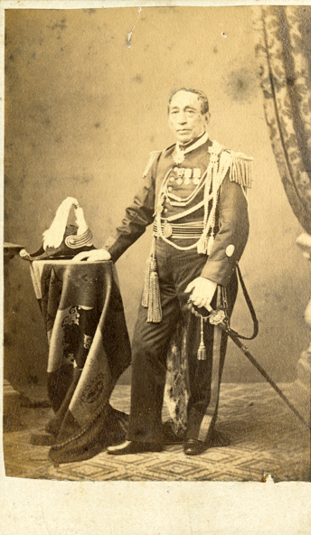 Retrato de Gerónimo Espejo (1801-1889), militar y escritor argentino, acompañó al Gral San Martín en la campaña a Chile y a Perú.